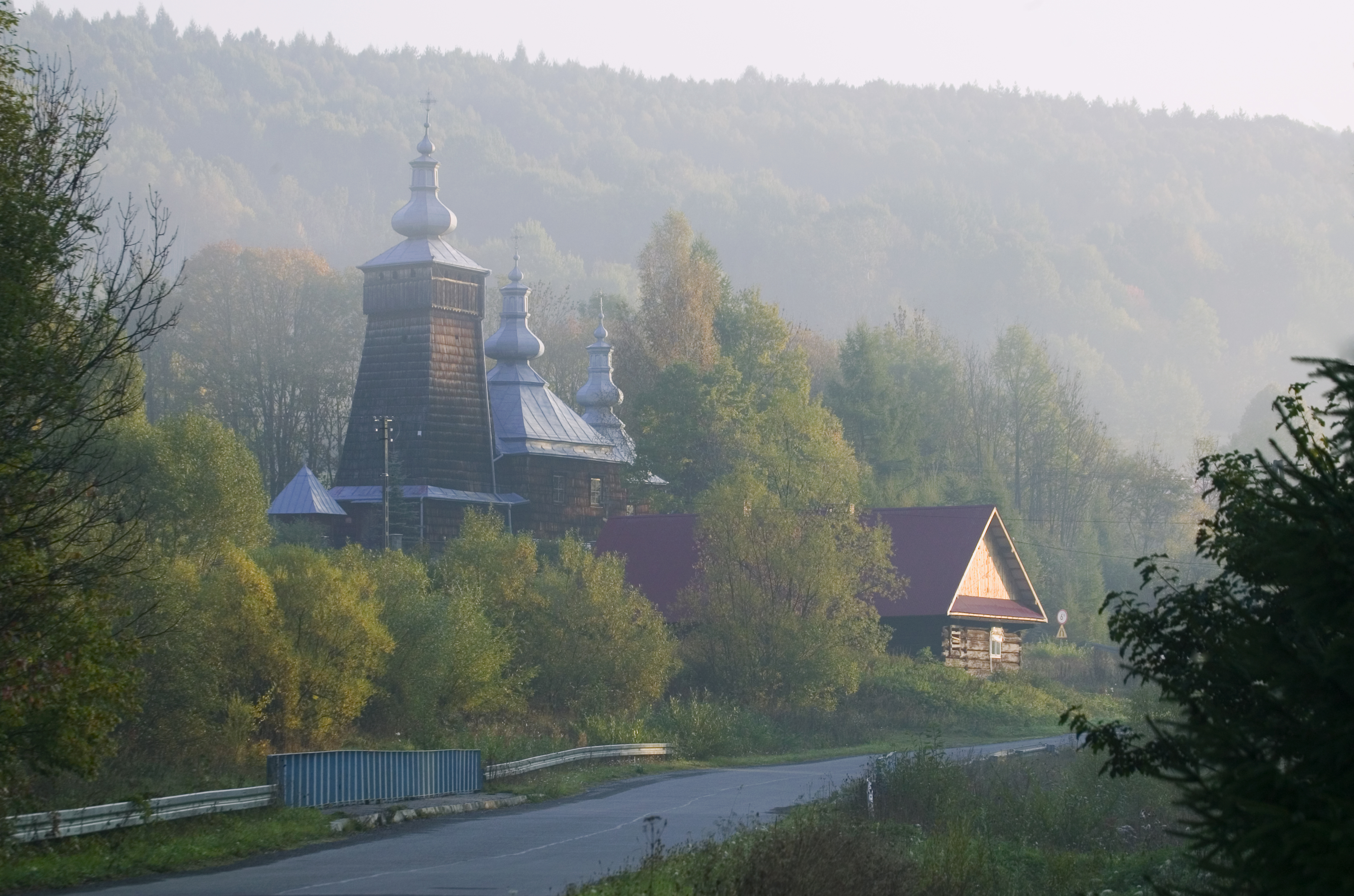 Leszczyny, cerkiew prawosławna p.w. św. Łukasza